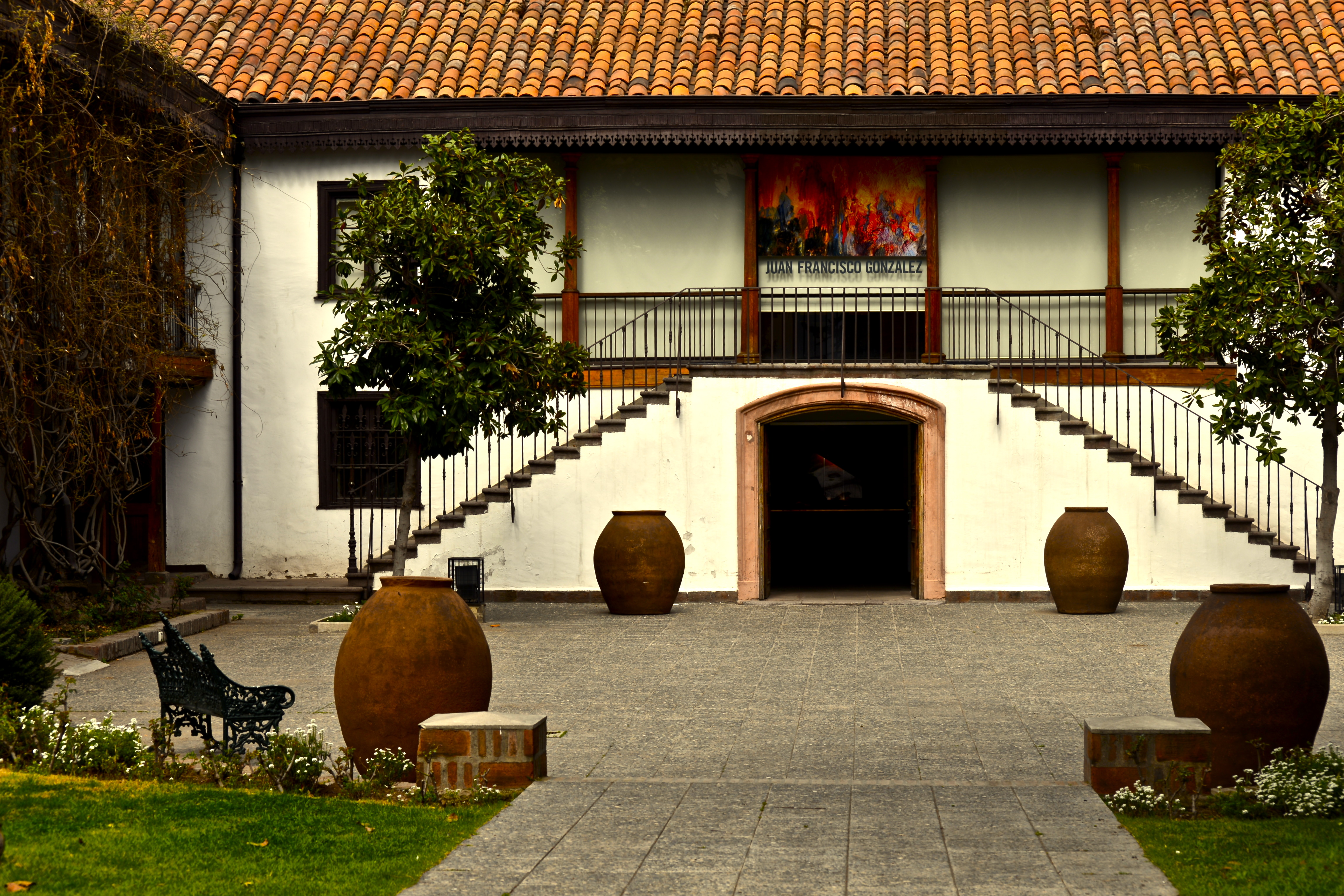 Casa y parque del Centro Cultural Las Condes, antigua chacra El Rosario. This is a photo of a national monument in Chile: 1635